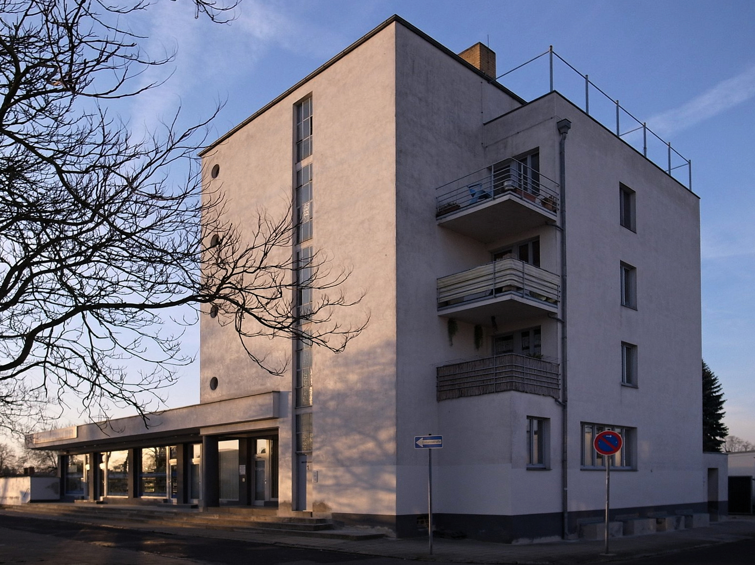 Dessau-Roßlau,Konsumgebäude von Walter Gropius